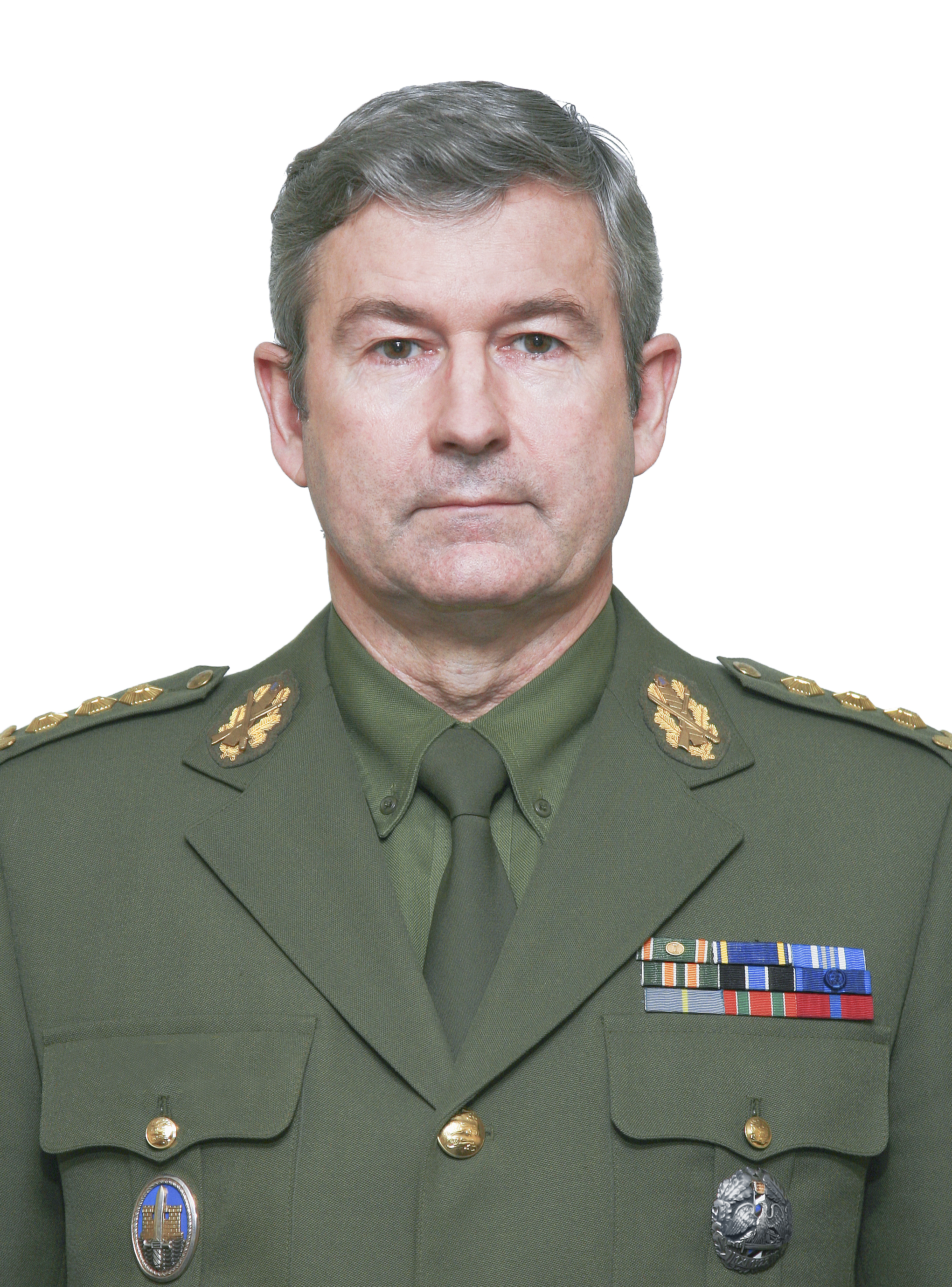 Kaasaegse piirivalveteenistuse looja ning esimene staabiülem Aare Evisalu.